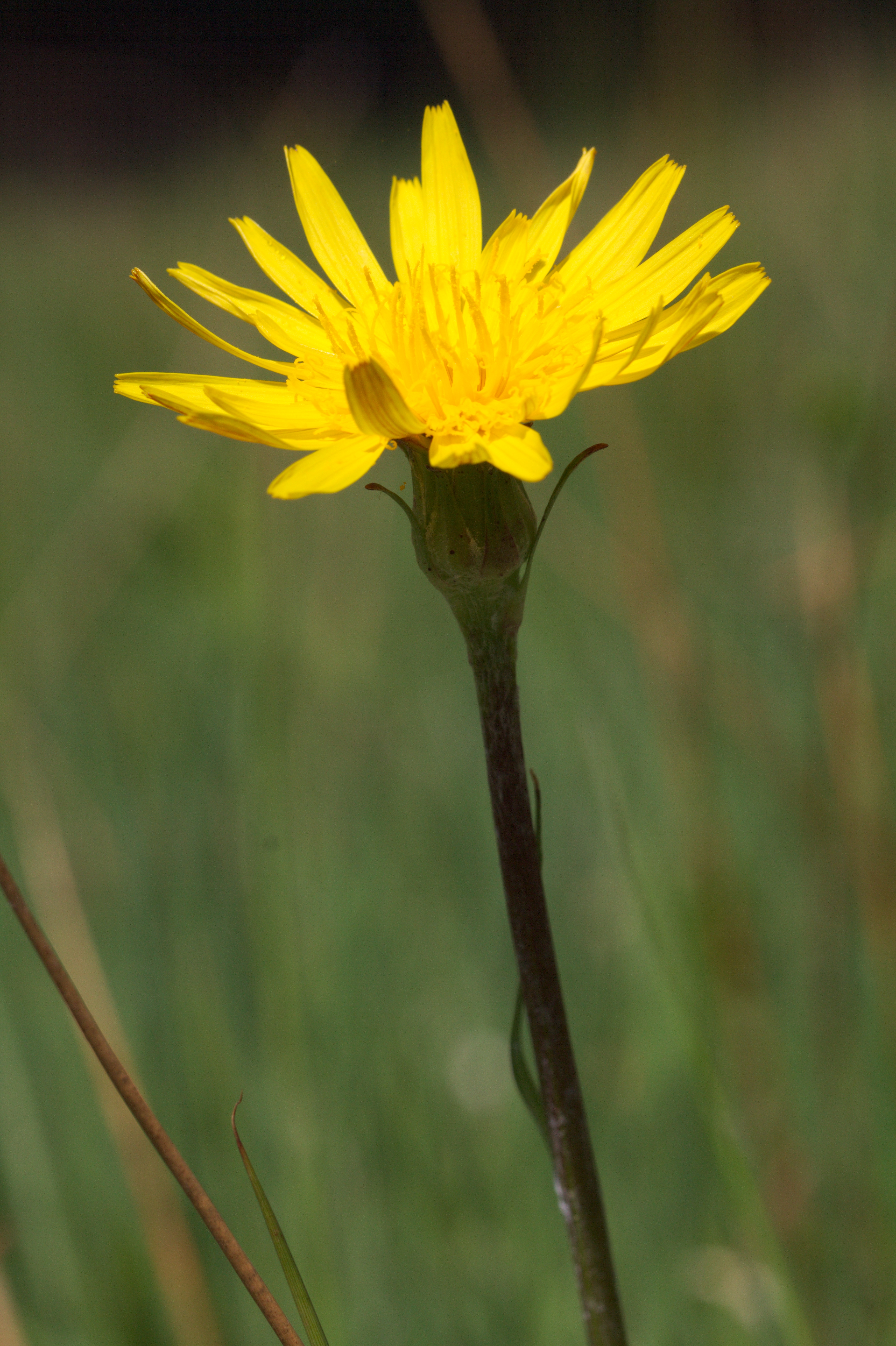 Zámek (přírodní památka) - Scorzonera humilis L., hadí mord nízký - status ohrožení v ČR: C3 (ohrožený)